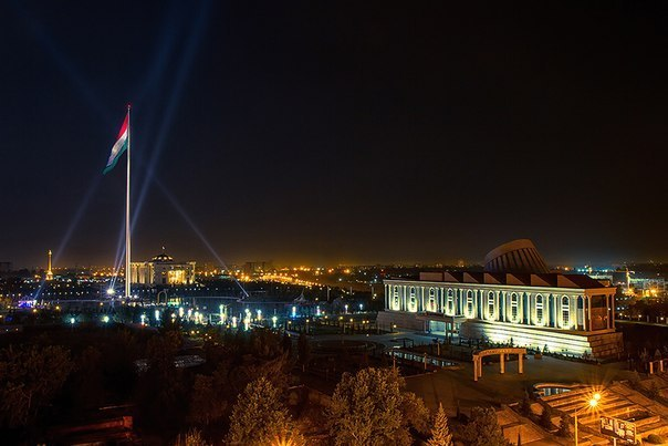 Прекрасный вид Флагштока ночью